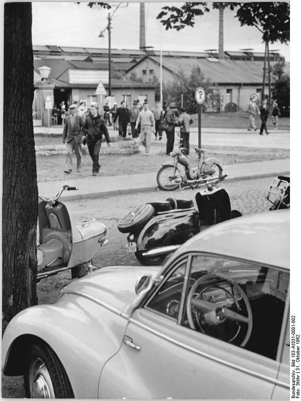 Hennigsdorf, VEB "Wilhelm Florin", Schichtwechsel Zentralbild Stöhr Ga-Pru 31.10.1962 Industriestadt Hennigsdorf verändert ihr Gesicht Am 18. März 1962 erhielt die Gemeinde hennigsdorf im Kreis Oranienburg Stadtrecht. Damit ist dieser Industrieort im Norden Berlins die jüngste Stadt unserer Republik. Die Arbeiter der beiden großbetriebe, VEB LRW "hans Beimler" und VEB Stahl- und Walzwerk "Wilhelm Florin" waren stets die treibenden Kräfte, früher im Kampf gegen die Konzernherren der Flick-Stahlwerke und der AEG, heute beim Aufbau des Sozialismus. Schritt für Schritt entsteht das neue, das sozialistische Hennigsdorf. UBz: Schichtwechsel im VEB Stahl- und Walzwerk "Wilhelm Florin".